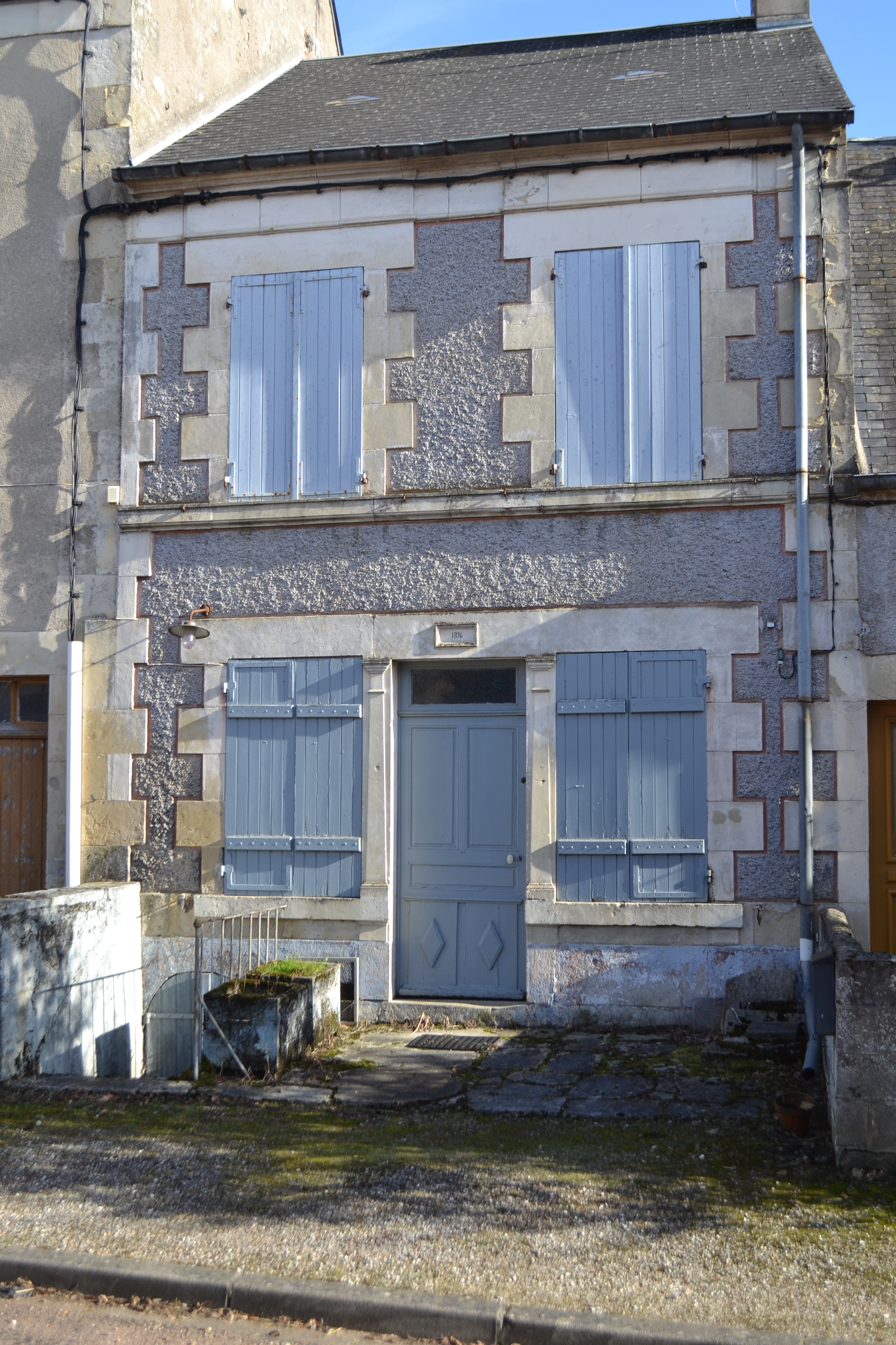 Maison du bourg, datée de 1876, Saint-Aubin-les-Forges (Nièvre).